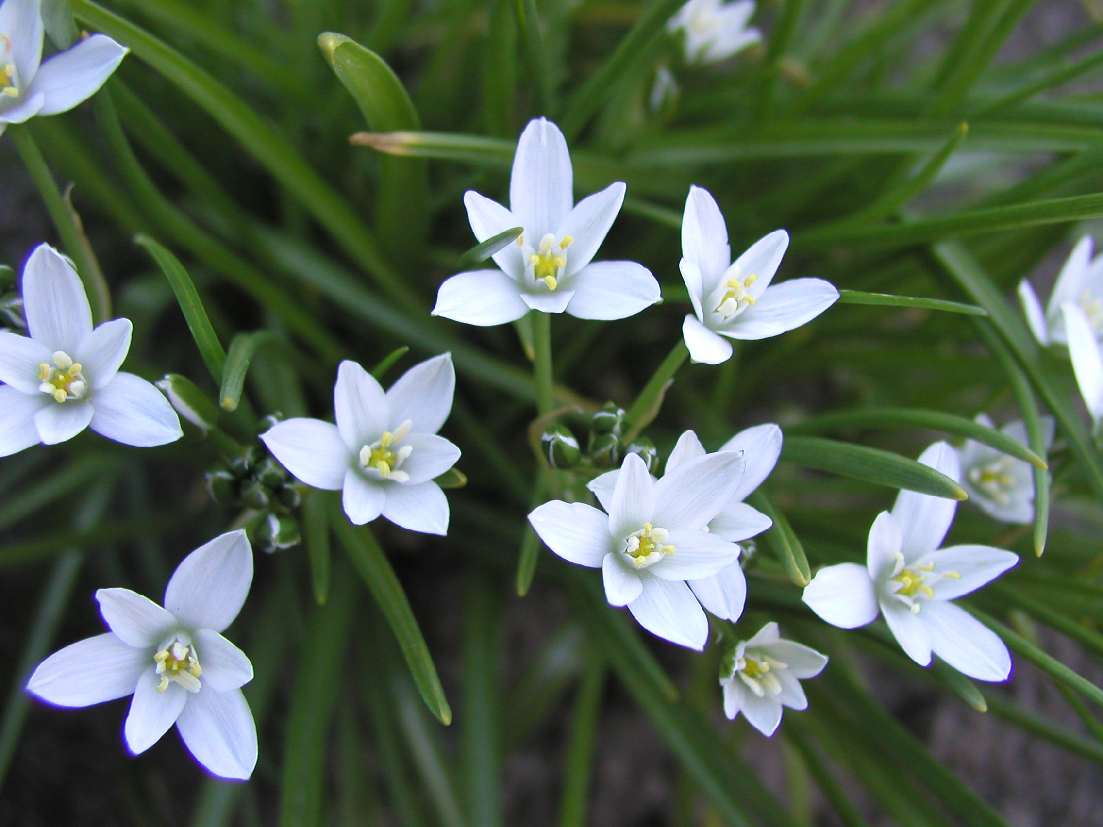 Śniedek_baldaszkowaty